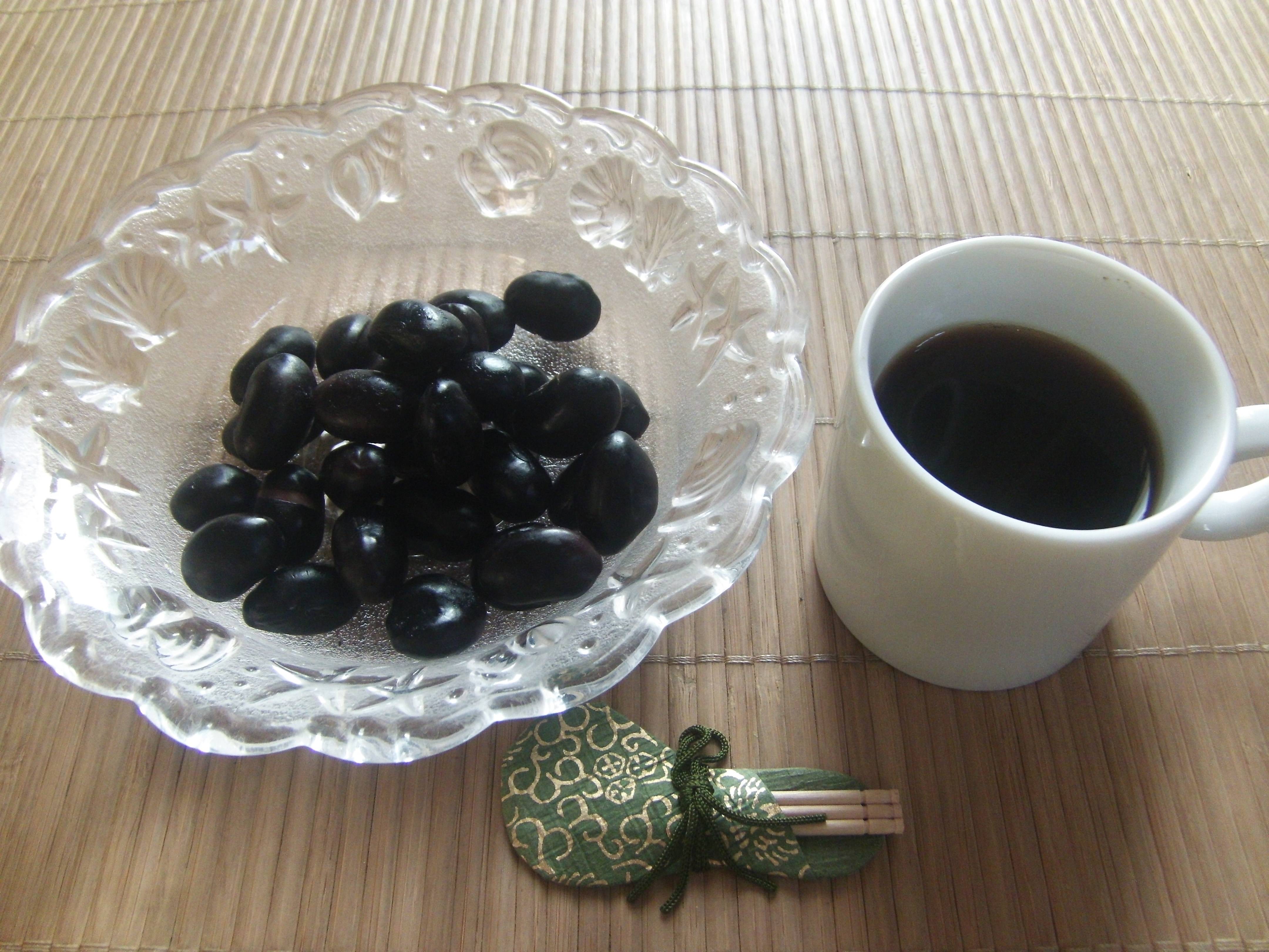 南丹市美山町の店で提供された地元(京都丹波高原)産無農薬有機栽培の丹波黒豆を用いた黒豆コーヒー(雑穀飲料)と煮豆